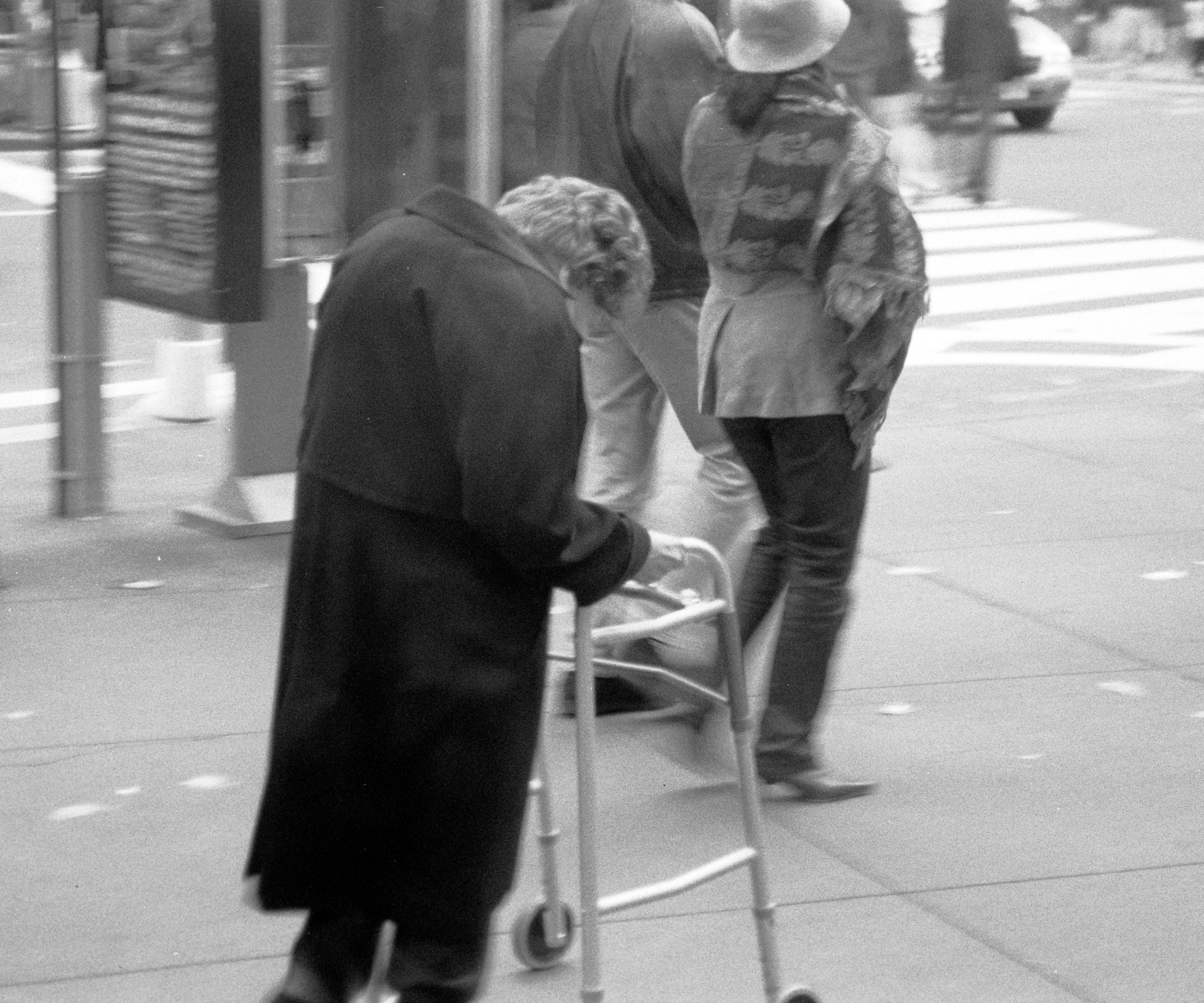 walker